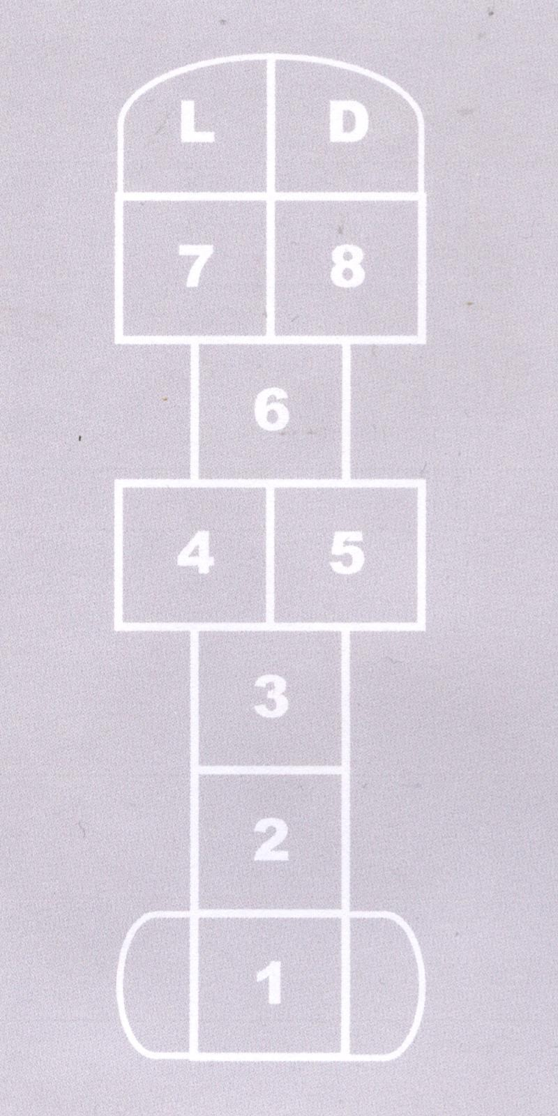 Oanbean troch Kees Swart op 13 april 2009